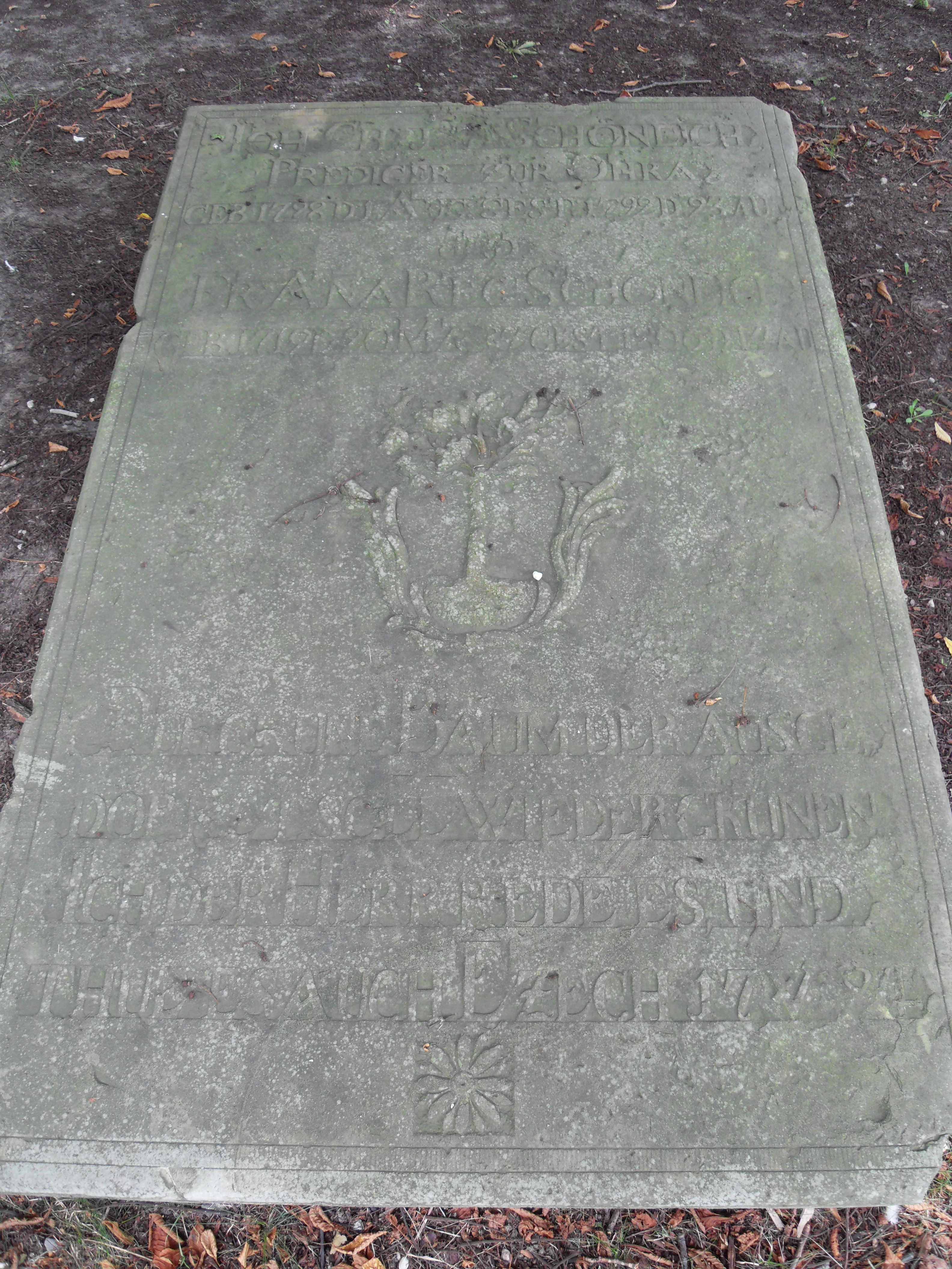 Płyta nagrobna pastora z Oruni, zmarłego w 1792 roku. Przechowywana w lapidarium, w Parku Akademickim w Gdańsku.